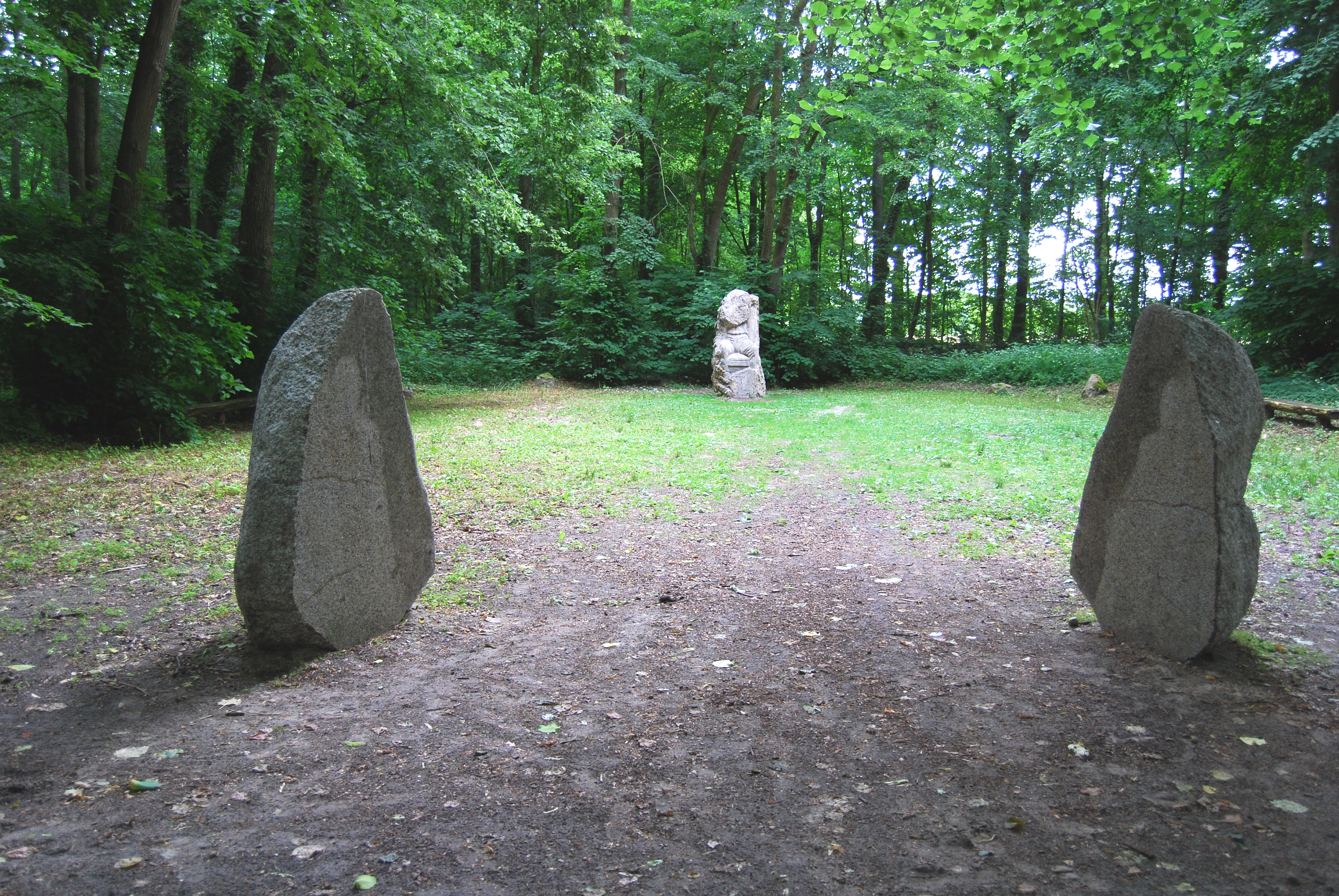 "Herrensitz mit zwei Wächtern" von Norbert Marten, Konzeption: Norbert Marten und Christel Mandos-Feldmann. Das Werk befindet sich frei zugängig im öffentlichen Raum der Stadt Westerstede.